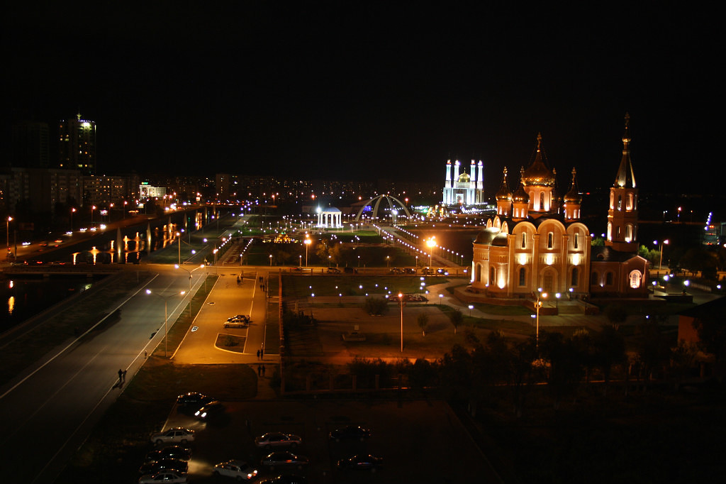 Ночной Актобе